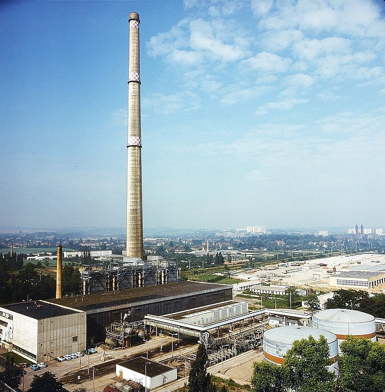 Heizkraftwerk Dresden-Reick